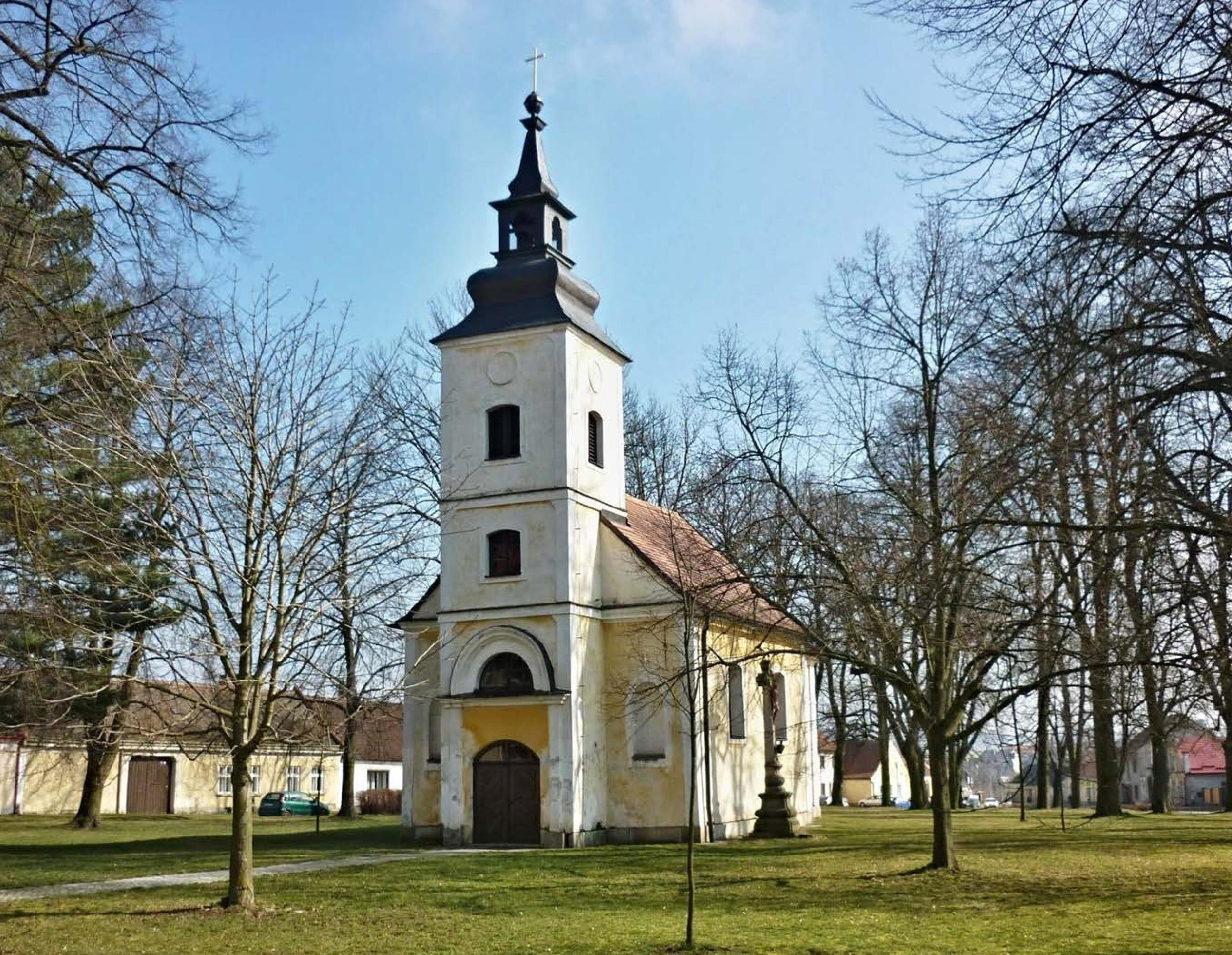 V malém parčíku na trojúhelníkovém Oldřichově náměstí stojí kaple Jména Panny Marie. Ta byla založena zdejším měšťanem Ondřejem Hanusíkem v roce 1719. V roce 1867 byla rozšířena péčí Josefa Tomáška v úhledný předměstský kostelík se zvonem z roku 1988.